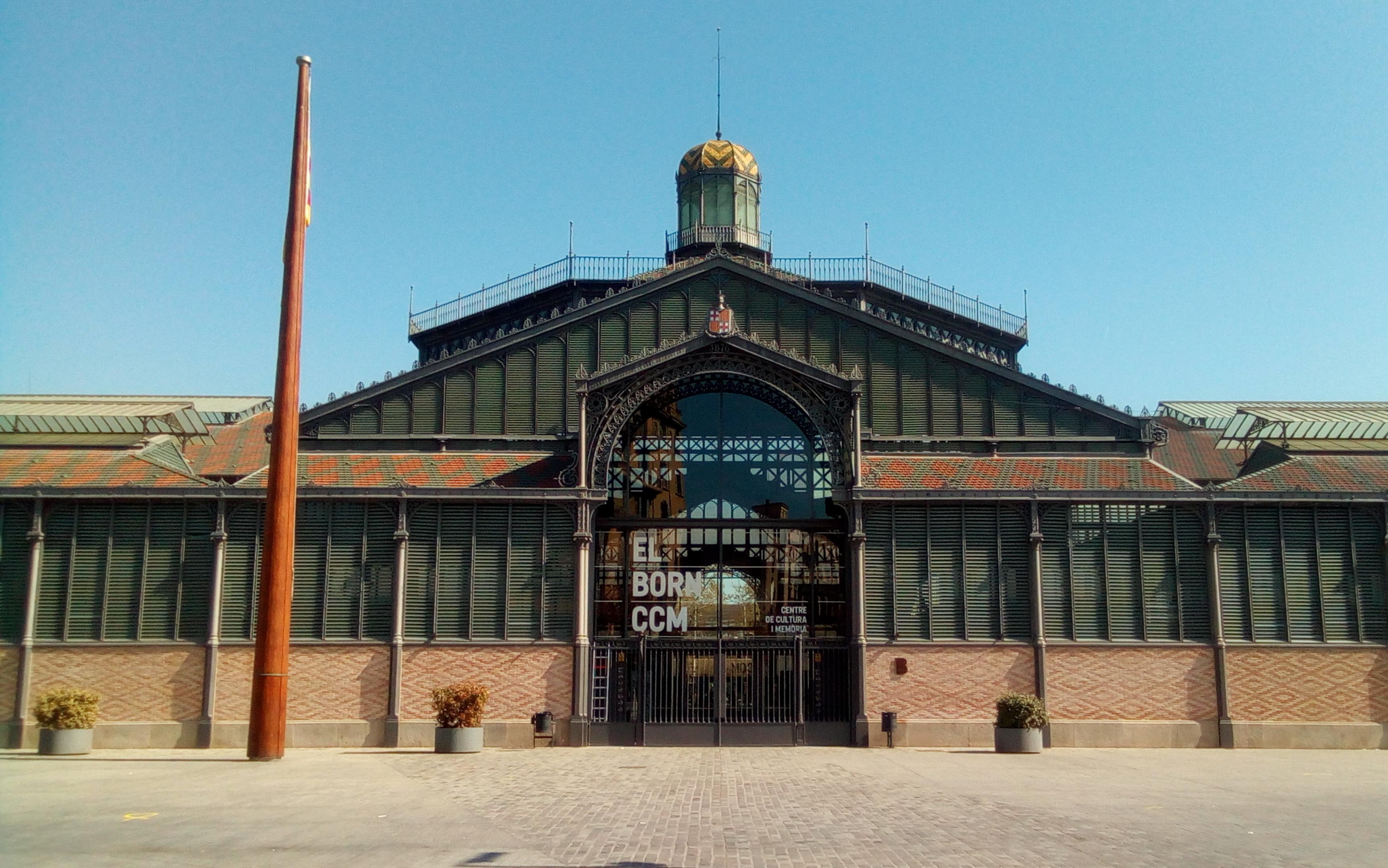 Mercado del Borne.